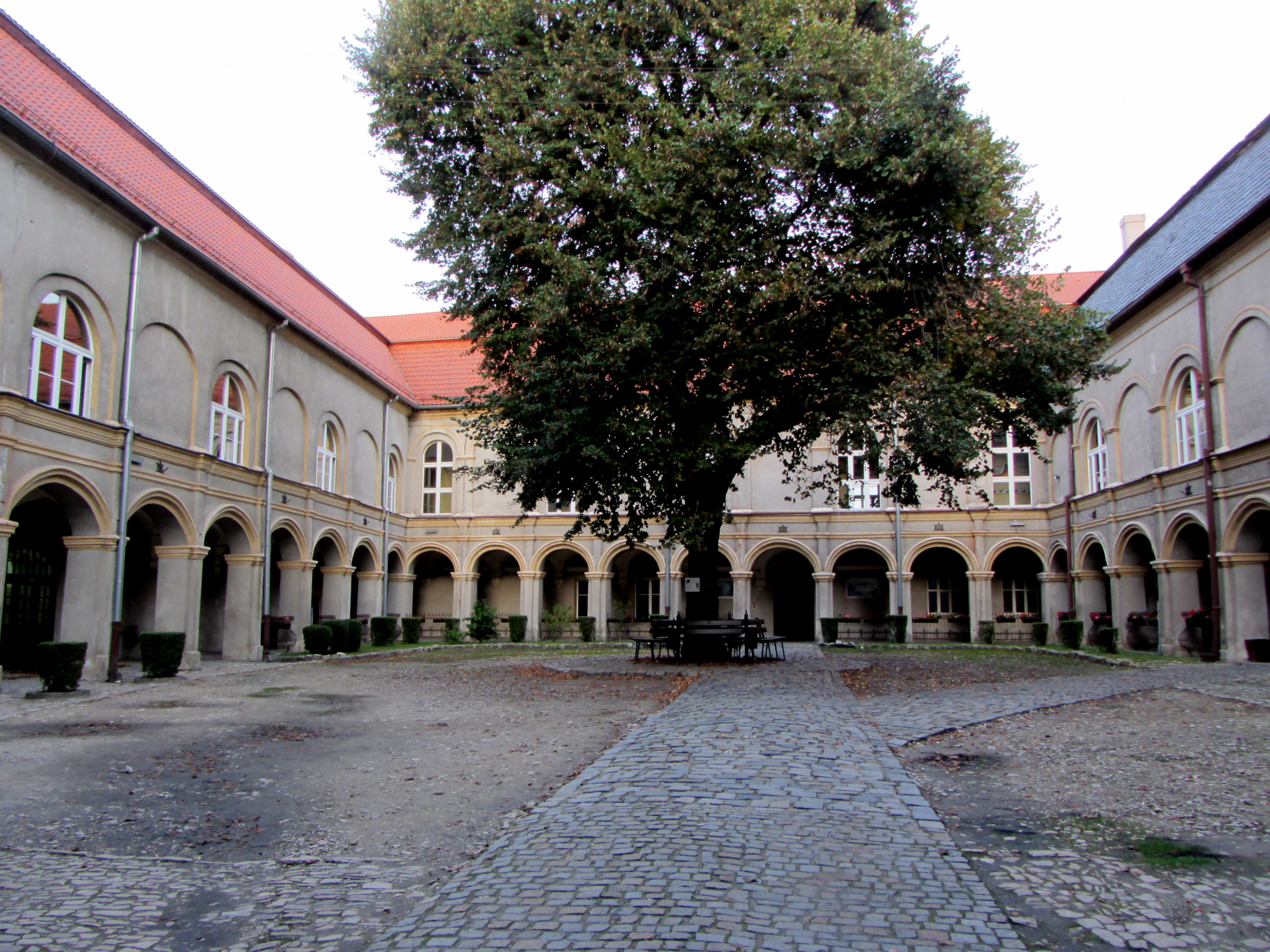 Krapkowice, zamek, 1678, XVIII, XX